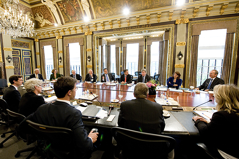 15/10/10: Het kabinet-Rutte vergadert voor de eerste maal in de Trêveszaal